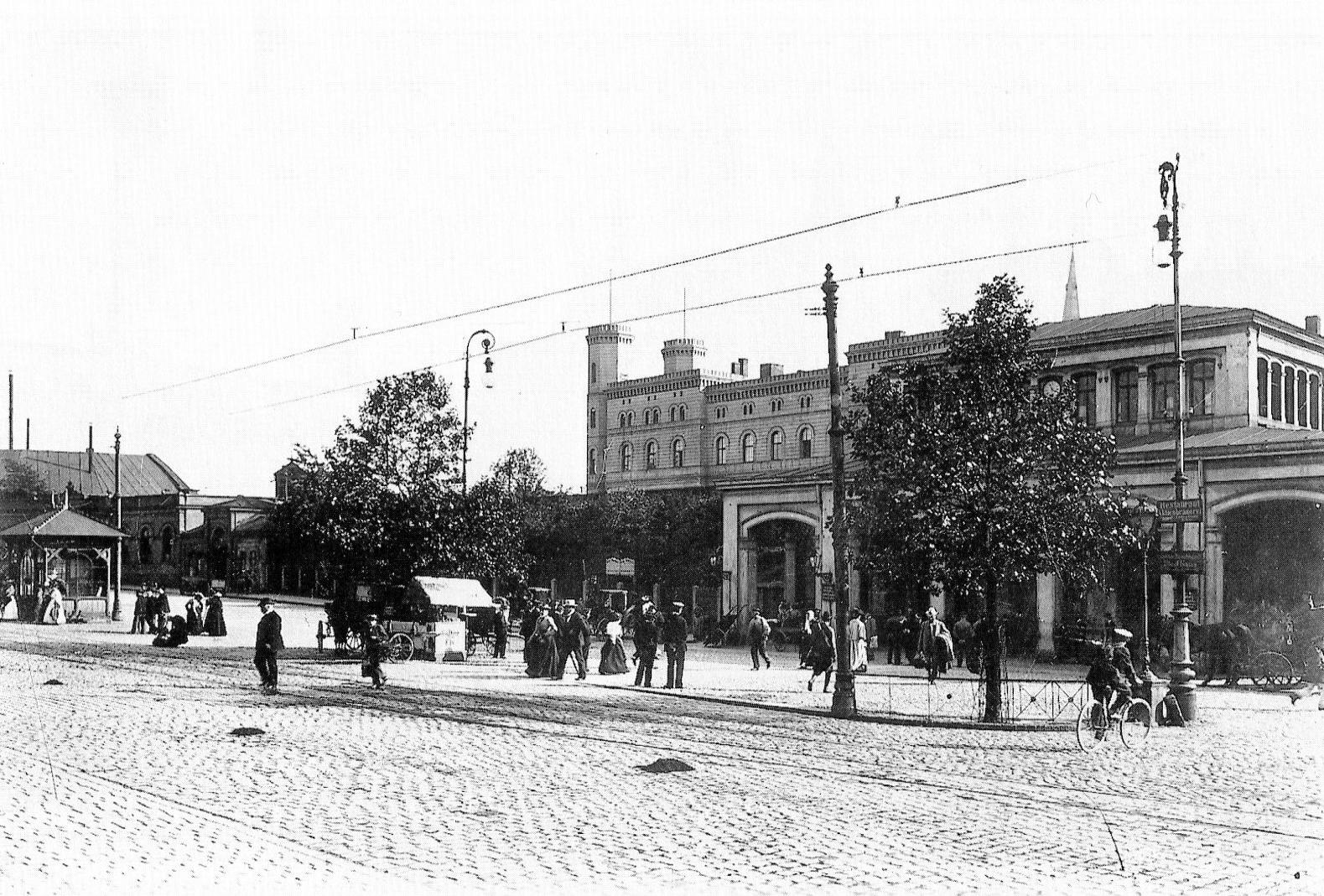 Bahnhofsvorplatz vor dem alten Görlitzer Bahnhof nach der Erweiterung von 1869. Im Hintergrund das Empfangsgebäude mit den beiden Türmen an der Ostseite.